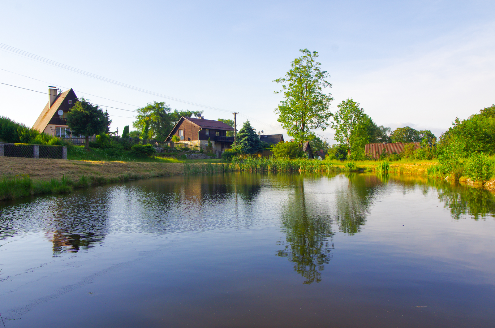 Mezihorská, pohled na osadu, Krušné Hory, okres Sokolov